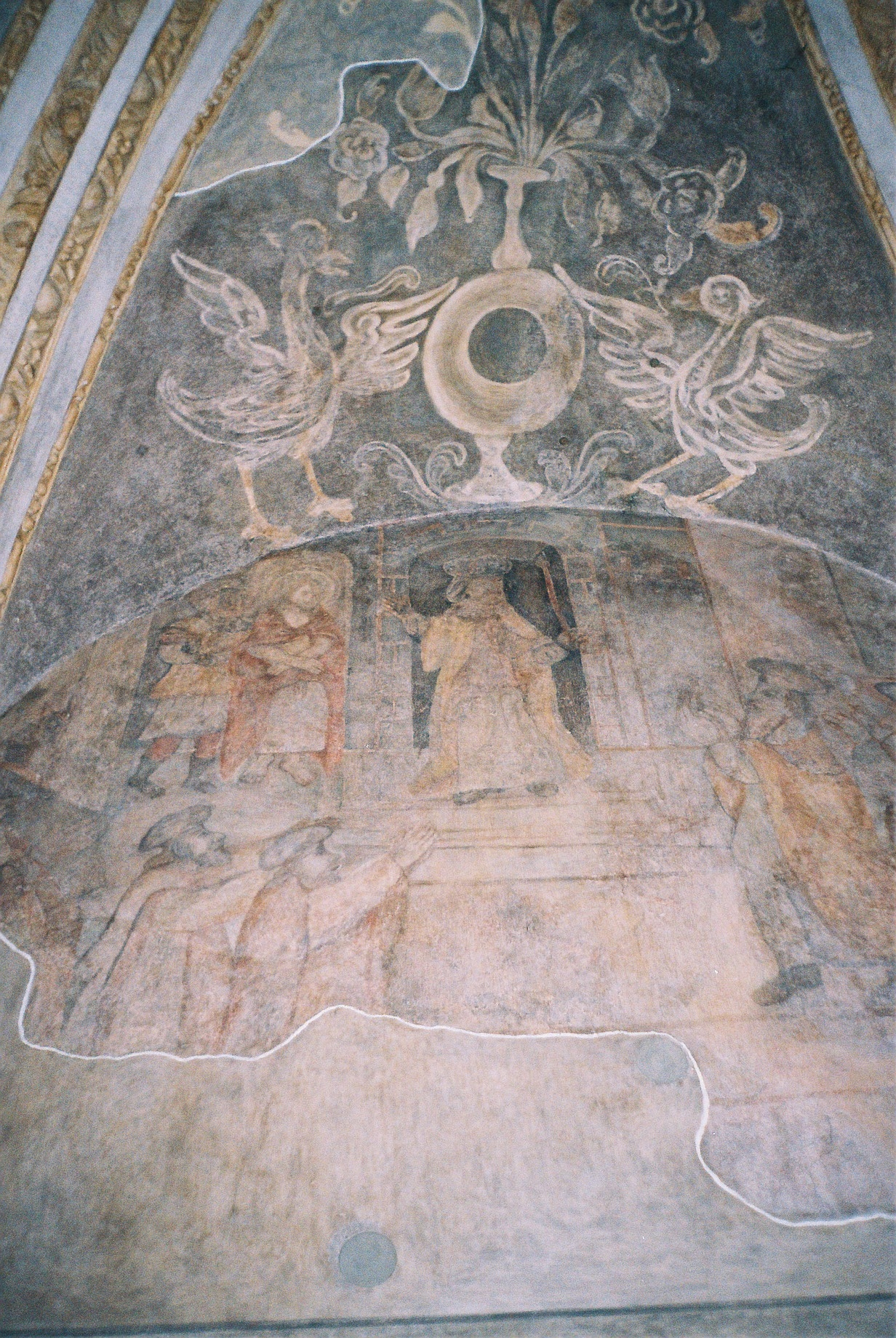 kamienica Gruszewiczów - wnętrze 17